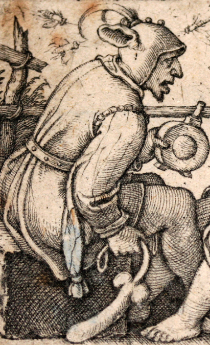 Fou du XVI° siècle tenant un godemiché.